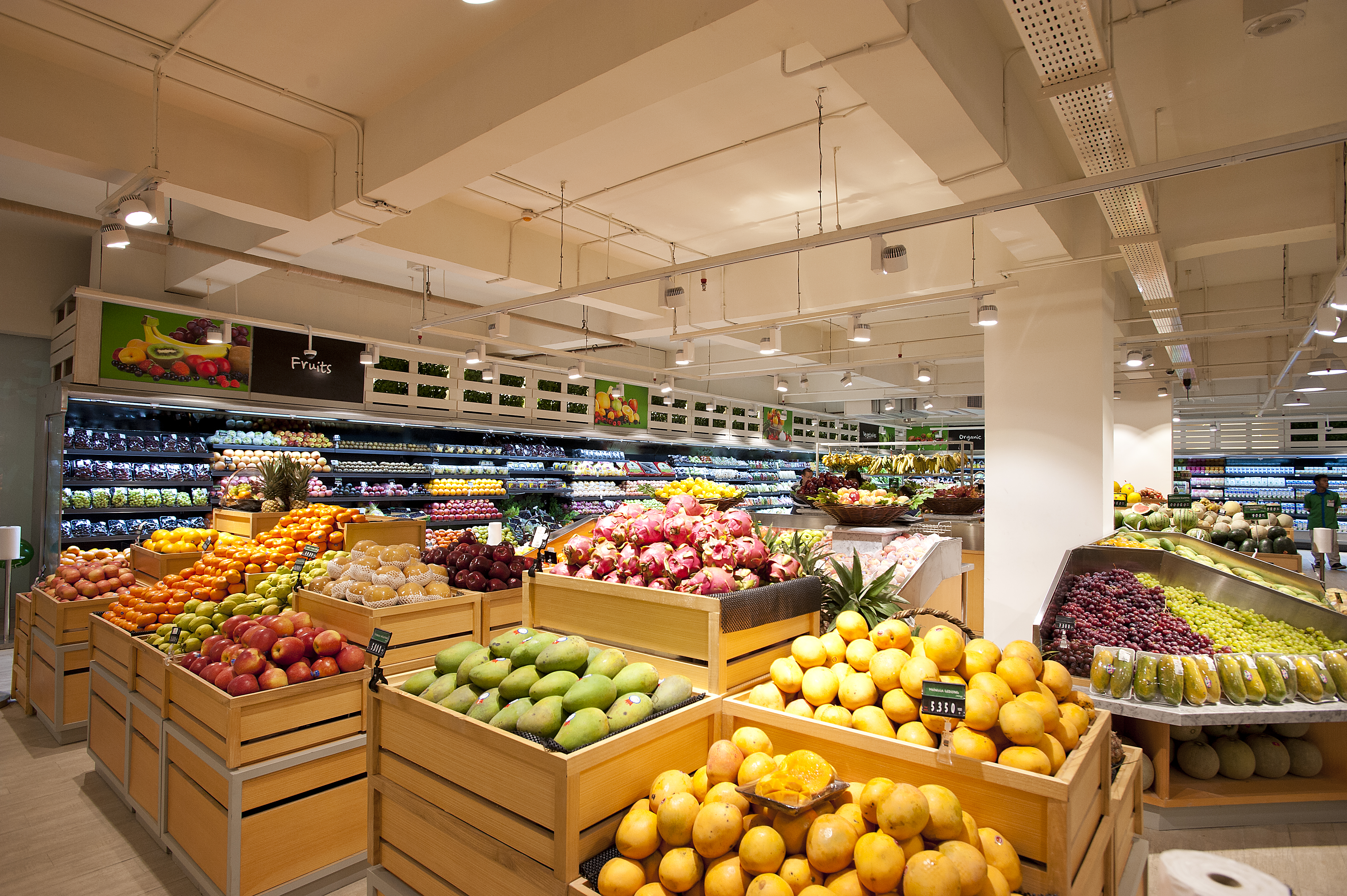 Pilihan buah-buahan segar di LOKA